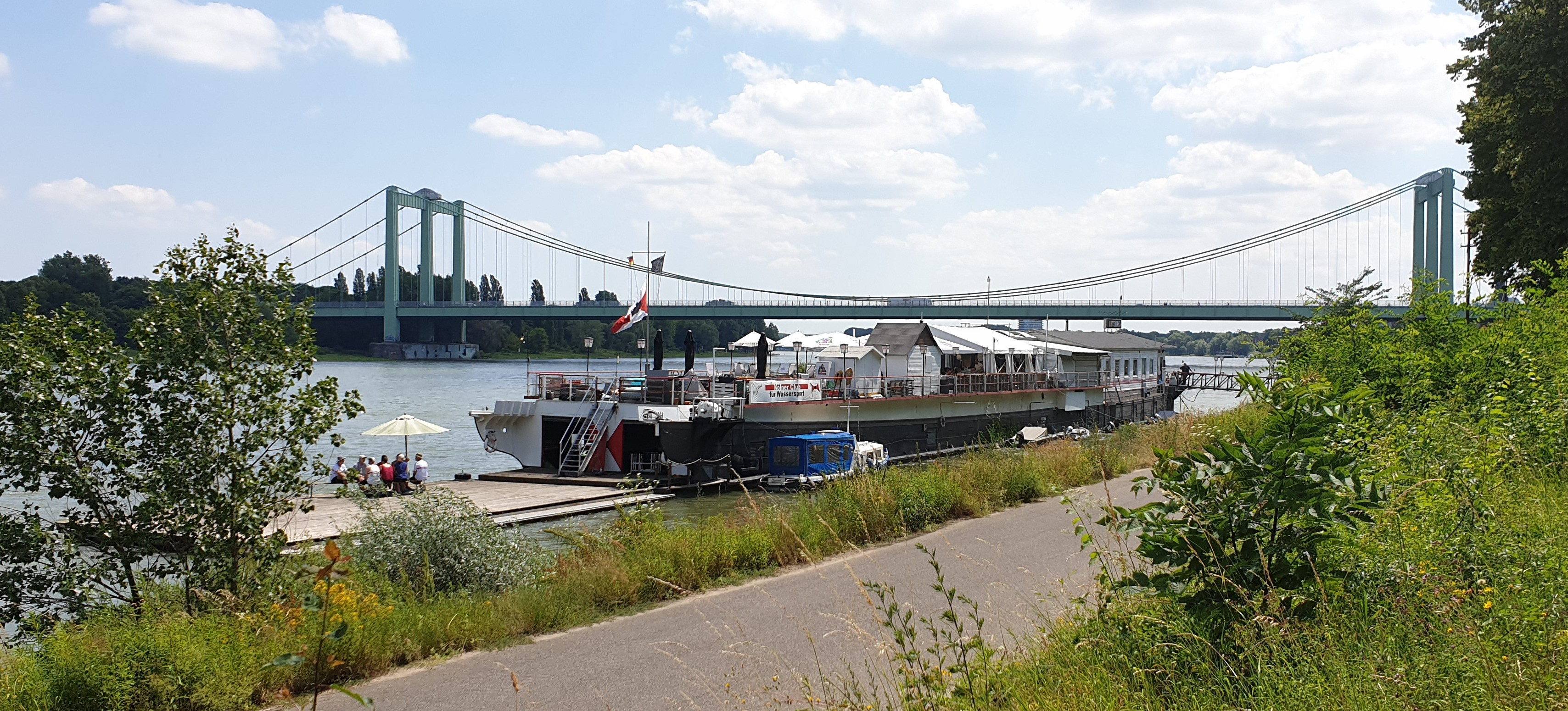 Schwimmendes Bootshaus des Kölner Clubs für Wassertsport e. V. am Rhein, im Hintergrund die Rodenkirchener Brücke.